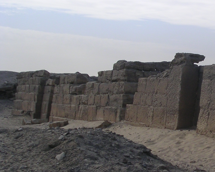 Vue du mastaba d'Ouserkafânkh situé à l'est de la pyramide de Niouserrê - Ve dynastie égyptienne